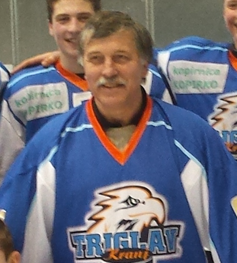 Hokejski klub Triglav Kranj, Slovenija. Kadeti-U16 (dečki do 16 let). Na sliki so kadeti letnik 1999, 2000 in 2001. Na sredini stoji trener Edo Hafner.